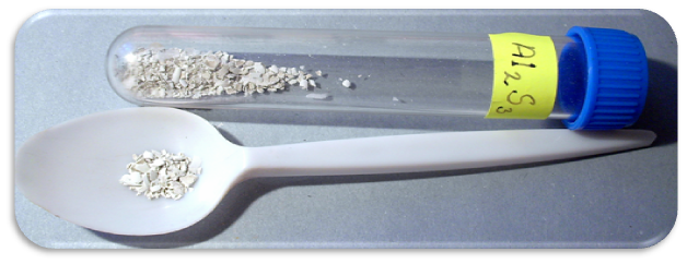 Sulfid hlinitý - Al2S3